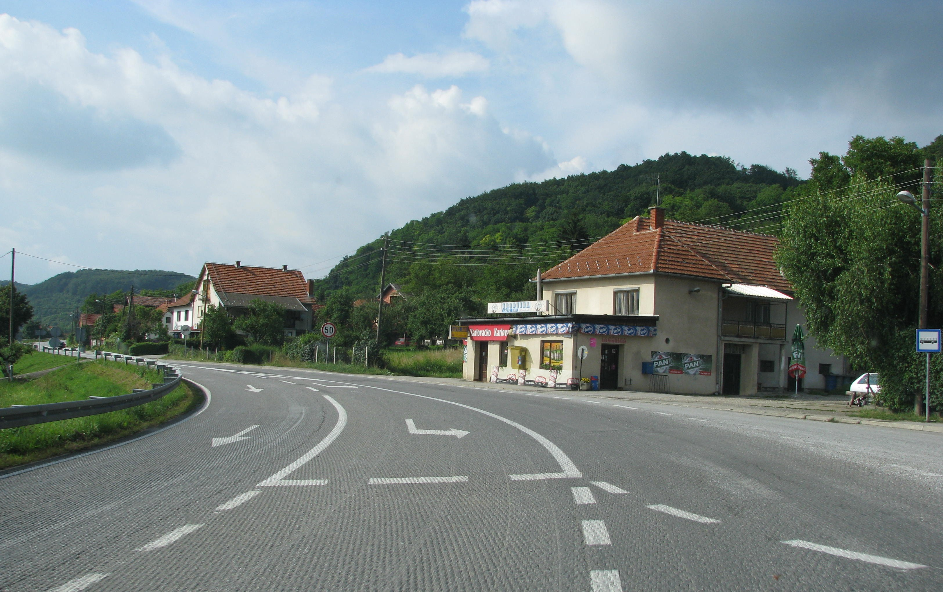 Presečno